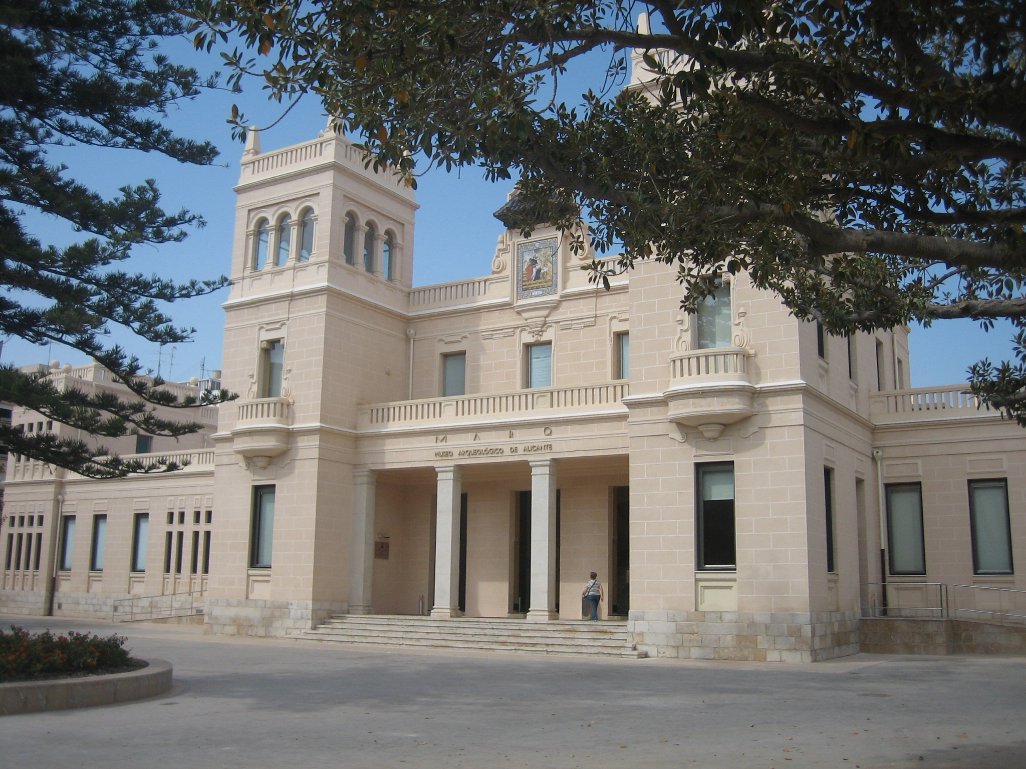 Fachada principal del Museo Arqueológico Provincial de Alicante (MARQ). Se encuentra ubicado en el antiguo Hospital de San Juan de Dios (en el barrio alicantino del Pla), construido entre 1926 y 1929. Autor: Rodriguillo Fecha: 21/06/2006